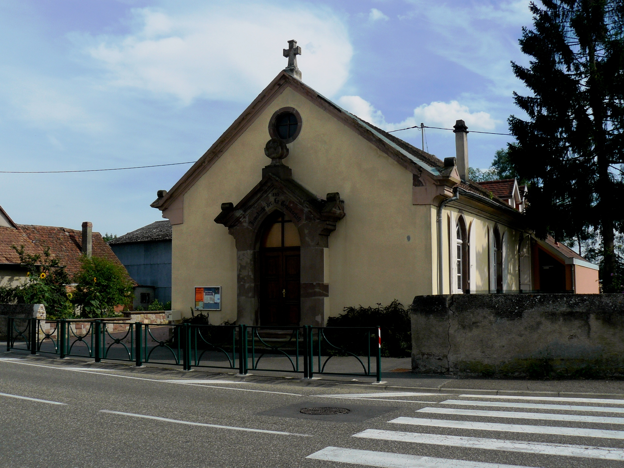 Église évangélique méthodiste (1885)